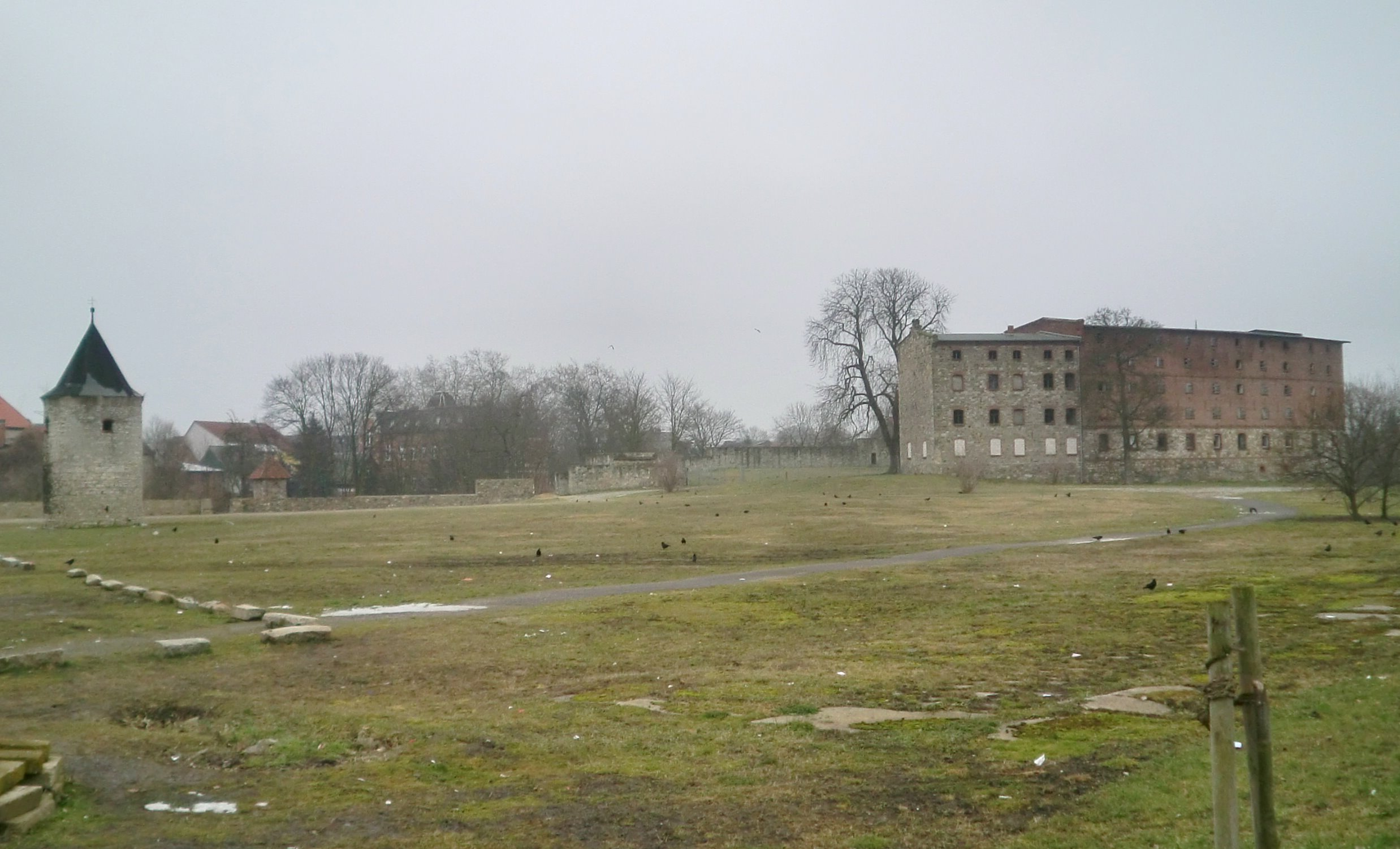 Gelände der ehemaligen Vorburg der Burg Oschersleben, Blick von Norden